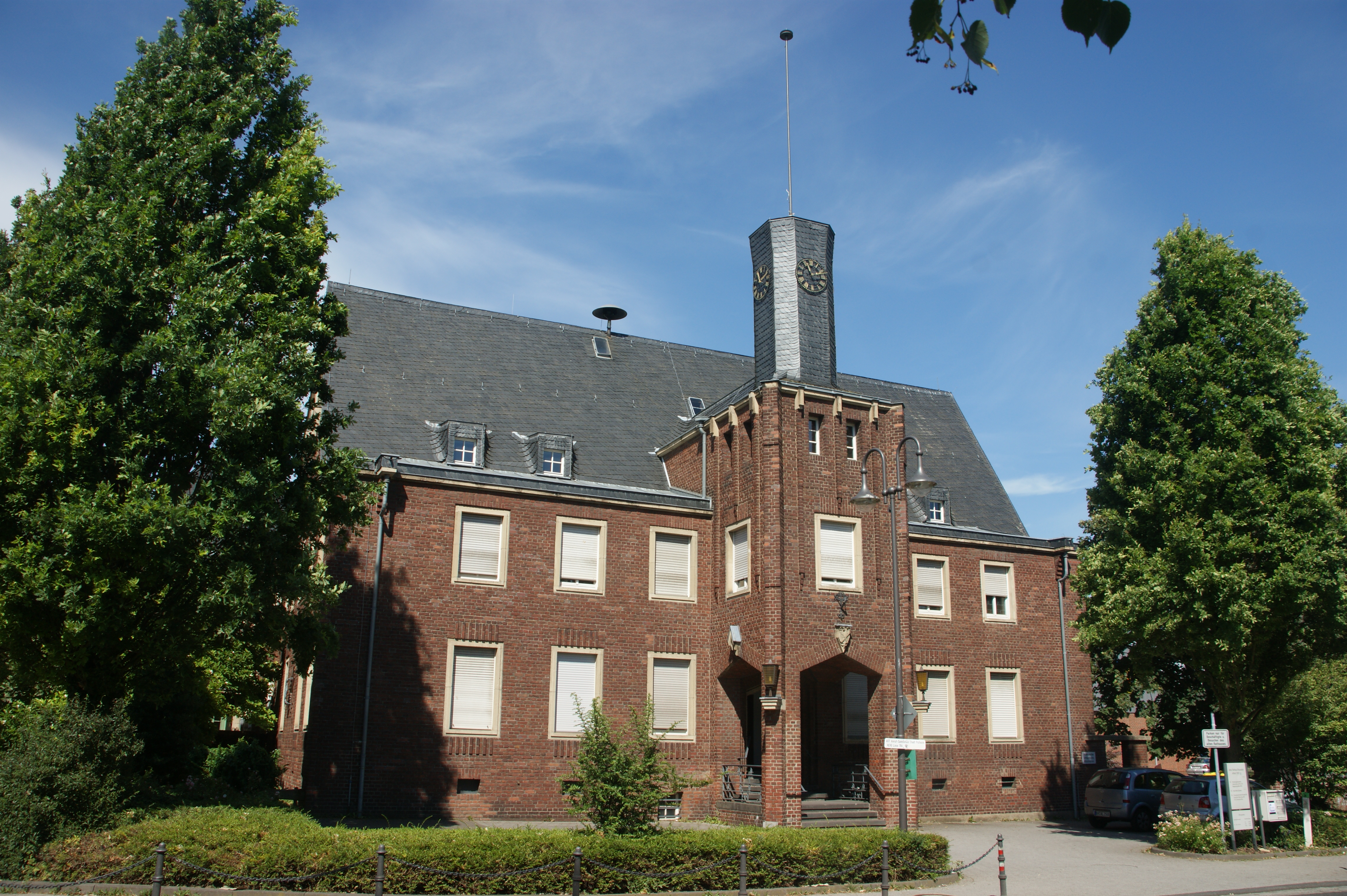 Pulheim-Brauweiler, denkmalgeschütztes ehemaliges Rathaus Konrad-Adenauer-Platz, This is a photograph of an architectural monument. /046